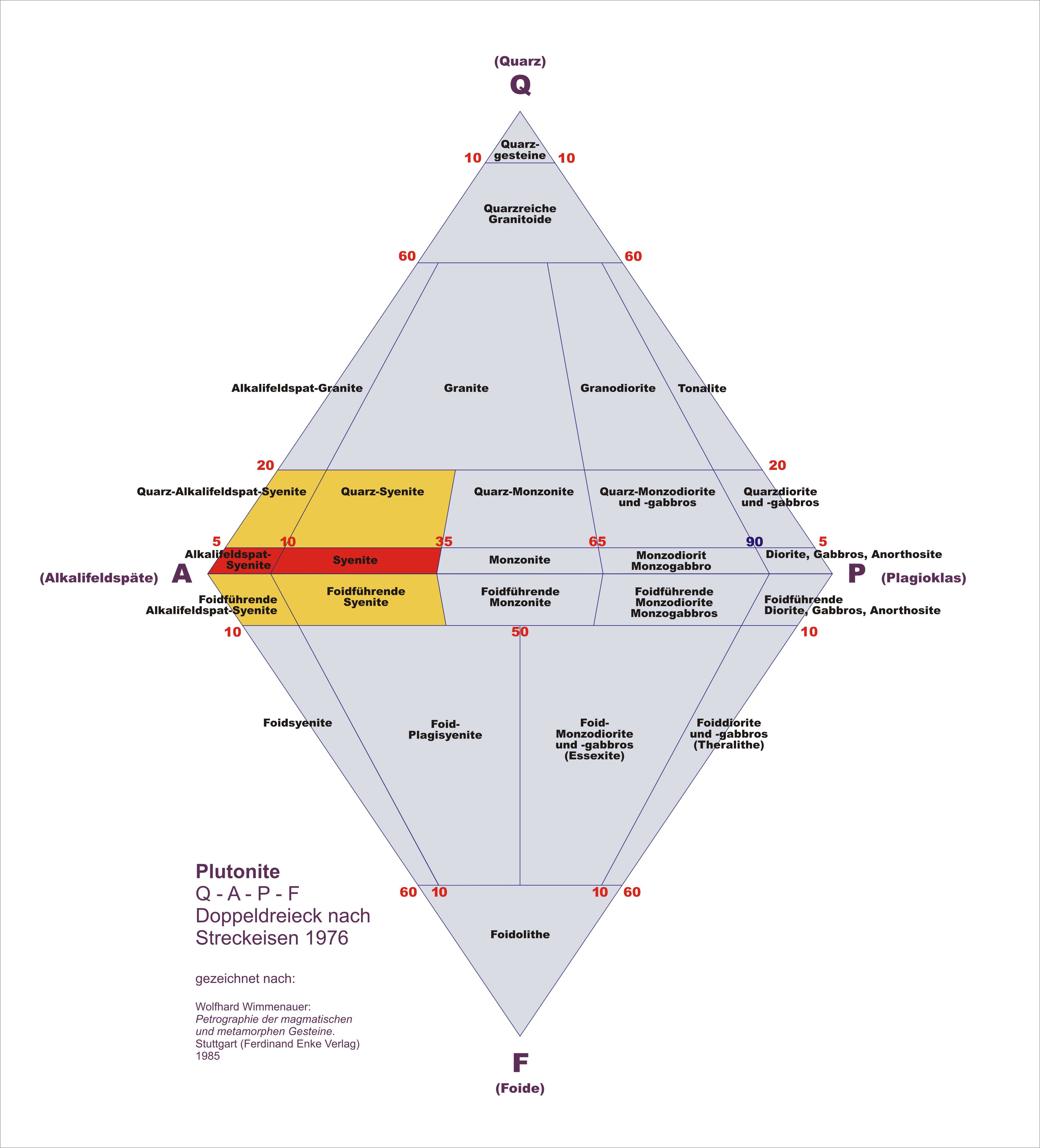 Streckeisendiagramm Syenite, Alkalifeldspatsyenite